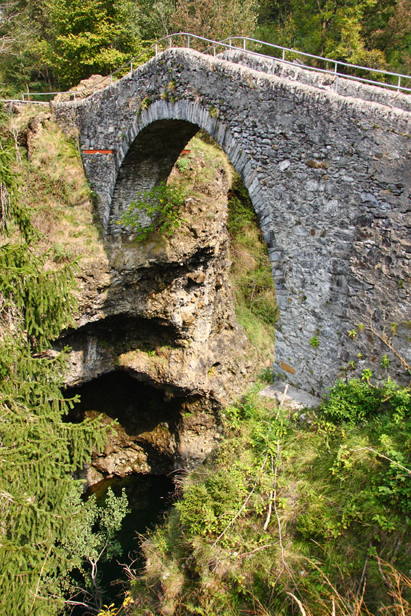 Il medioevale ponte del Maglione a Re (VB) sopra la stretta gola formata dal torrente Melezzo orientale.